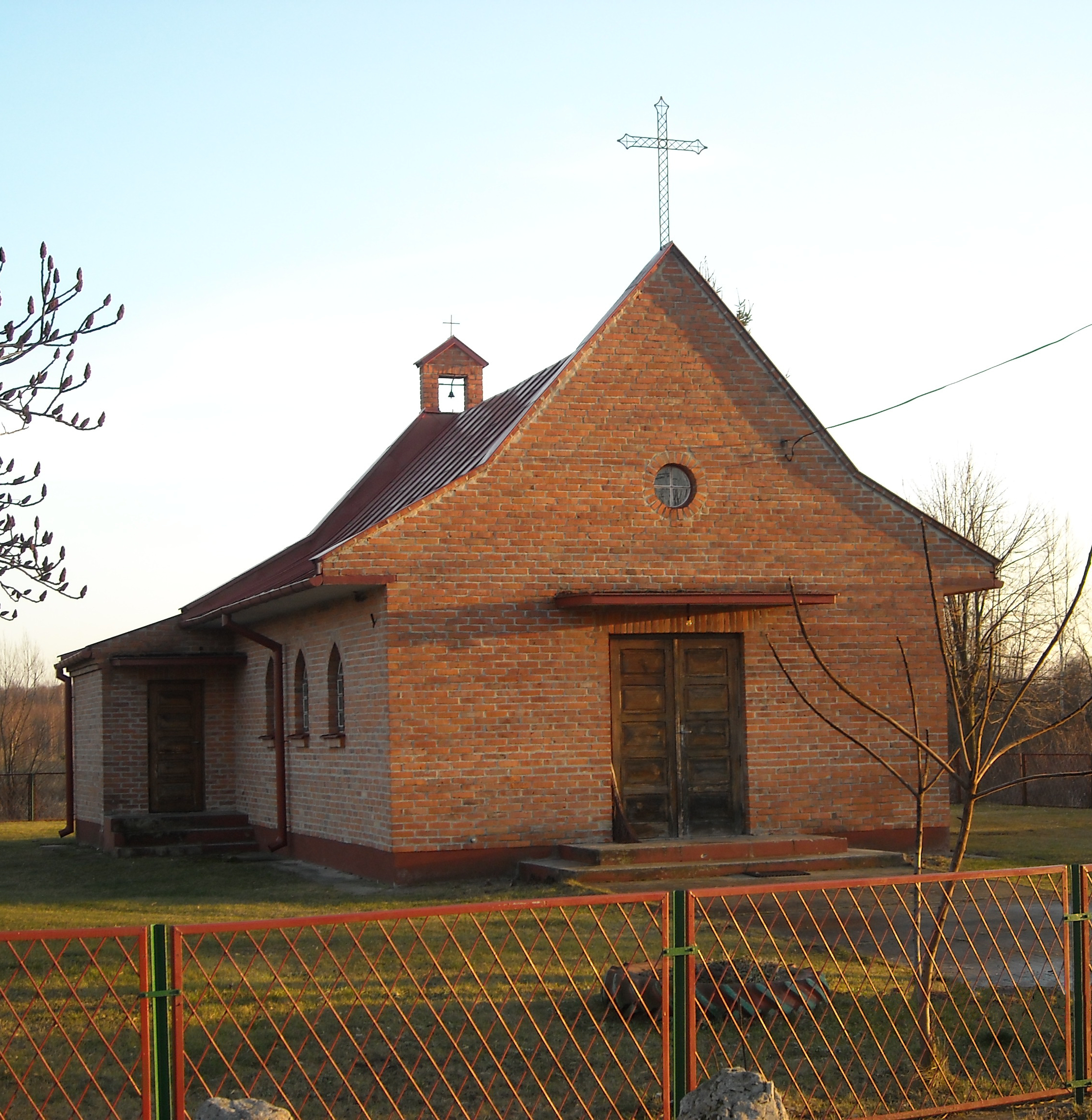 Kaplica rzymskokatolicka w Rudce (parafia św. Stanisława BM i Niepokalanego Serca NMP w Rudzie Hucie)